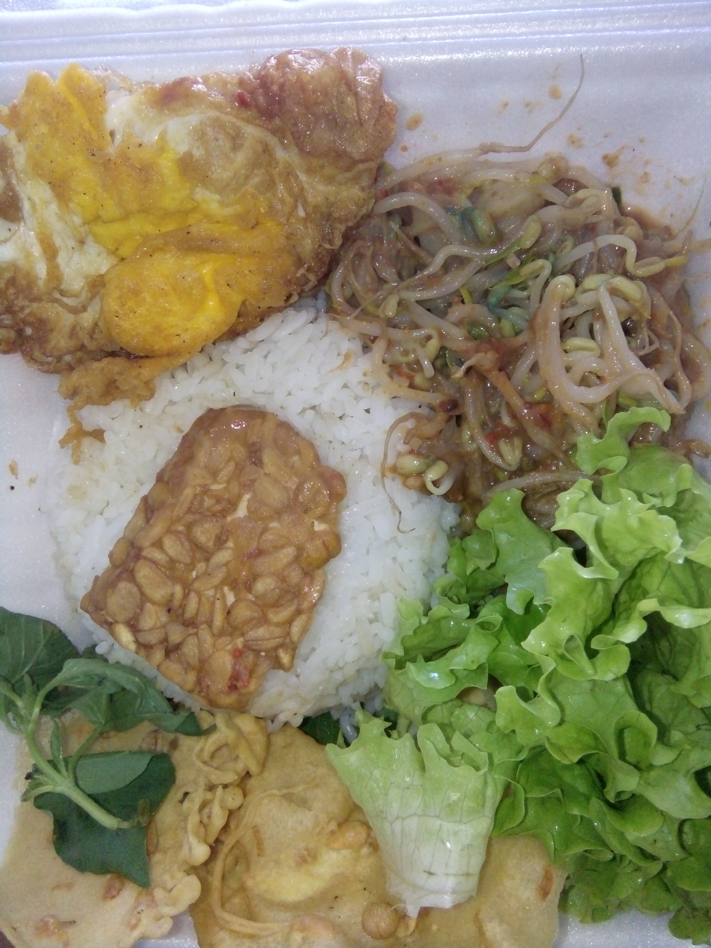 Nasi Pecel di Kuta, Bali. Pecel atau pecal adalah makanan yang umumnya diketahui berasal dari pulau Jawa, meskipun jenis makanan ini bisa ditemukan juga di Thailand, Malaysia, Philipina dan Suriname. Pecel yang terdiri dari bahan sayur-sayuran, seperti toge, kol, timun, ditaburi bumbu kacang, semakin nikmat saat dikombinasikan dengan Nasi, telur ceplok (bisa juga telor dadar), dan rempeyek. Nasi Pecel sudah ada hampir di seluruh wilayah di Indonesia.